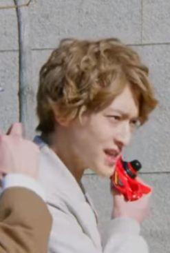 夜野魁利 / ルパンレッド